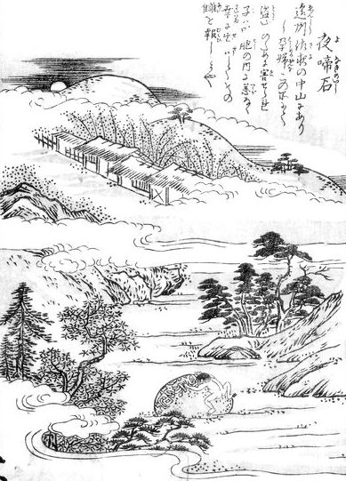 Yonakinoishi (夜啼石) from the Konjaku Hyakki Shūi (今昔百鬼拾遺)